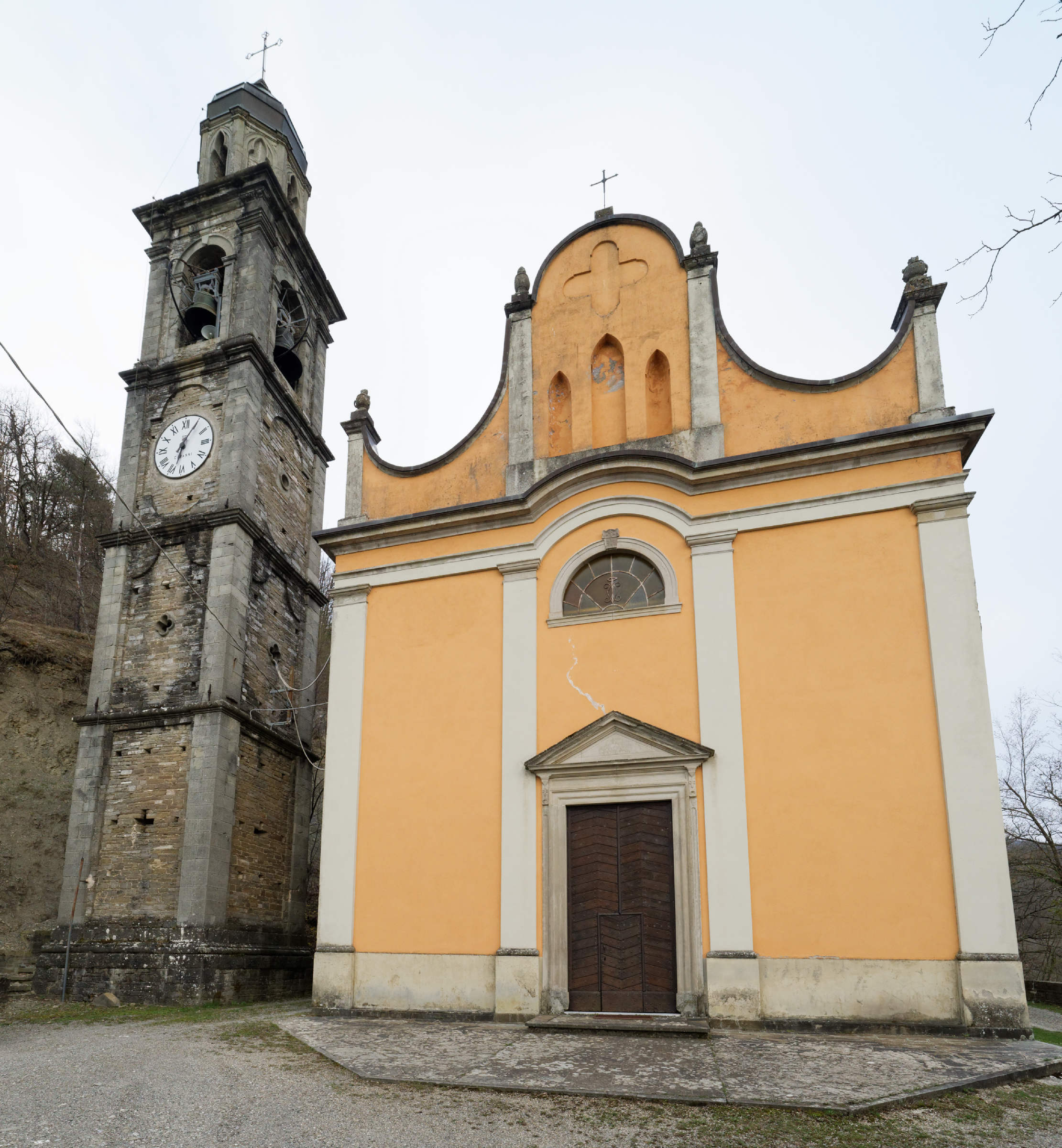 Chiesa dei Santi Vito, Modesto e Crescenzia (Gravago, PR, Italia).